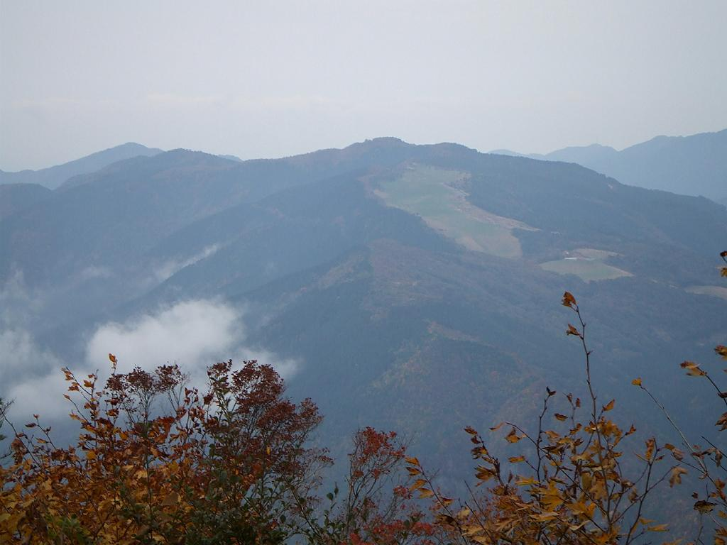 中津山から見たら、大きな牧場の上に山頂がある腕山